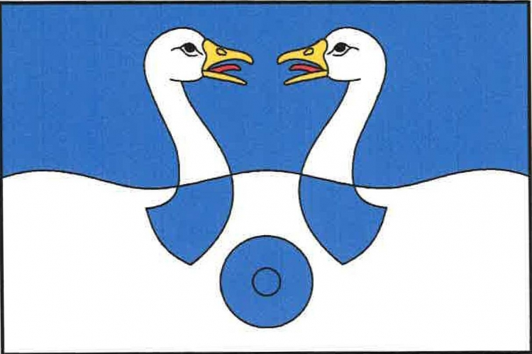 vlajka, Mezná, okres Tábor